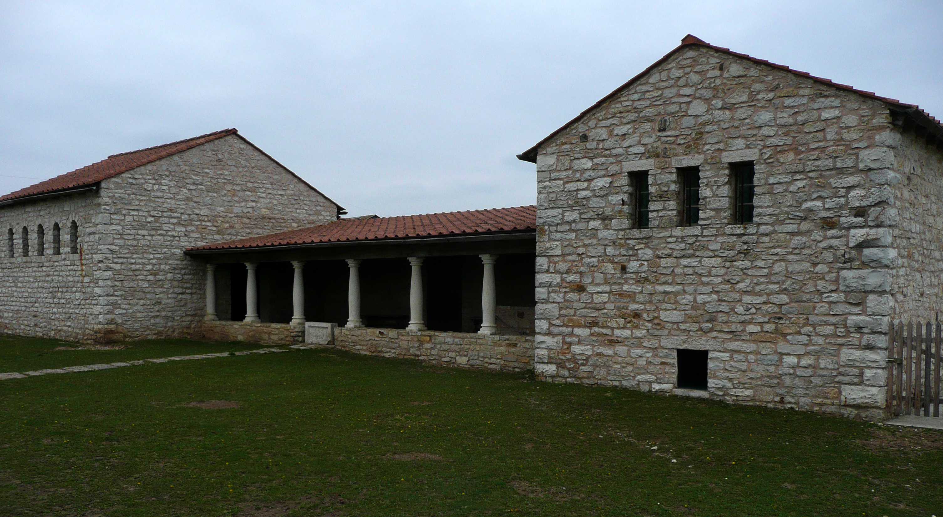 Römischer Gutshof (villa rustica) in Möckenlohe (Originalgetreue Rekonstruktion Ende 20. Jh.).